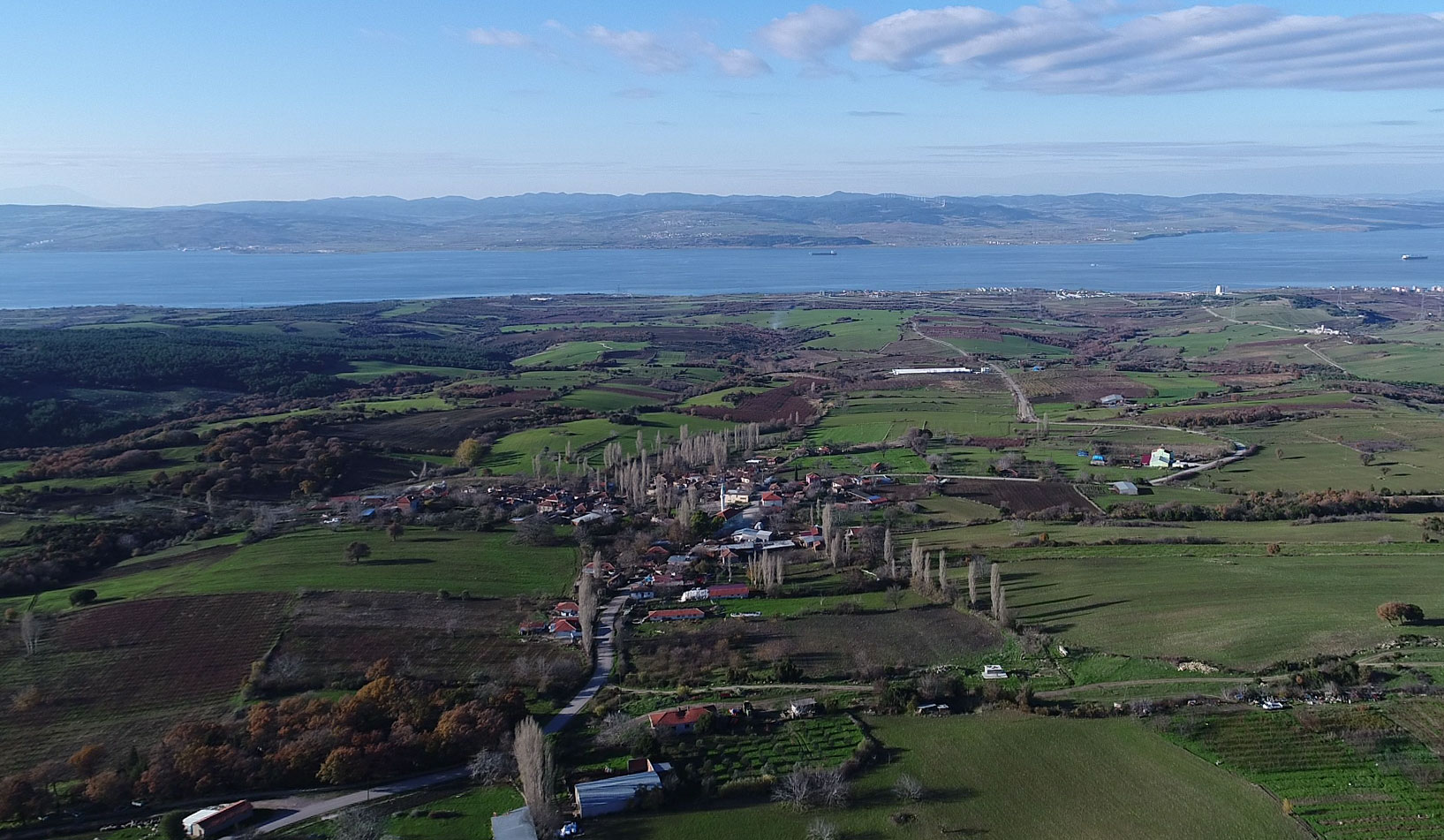 Lapseki Kocaveli Köyü Havadan Fotoğrafı